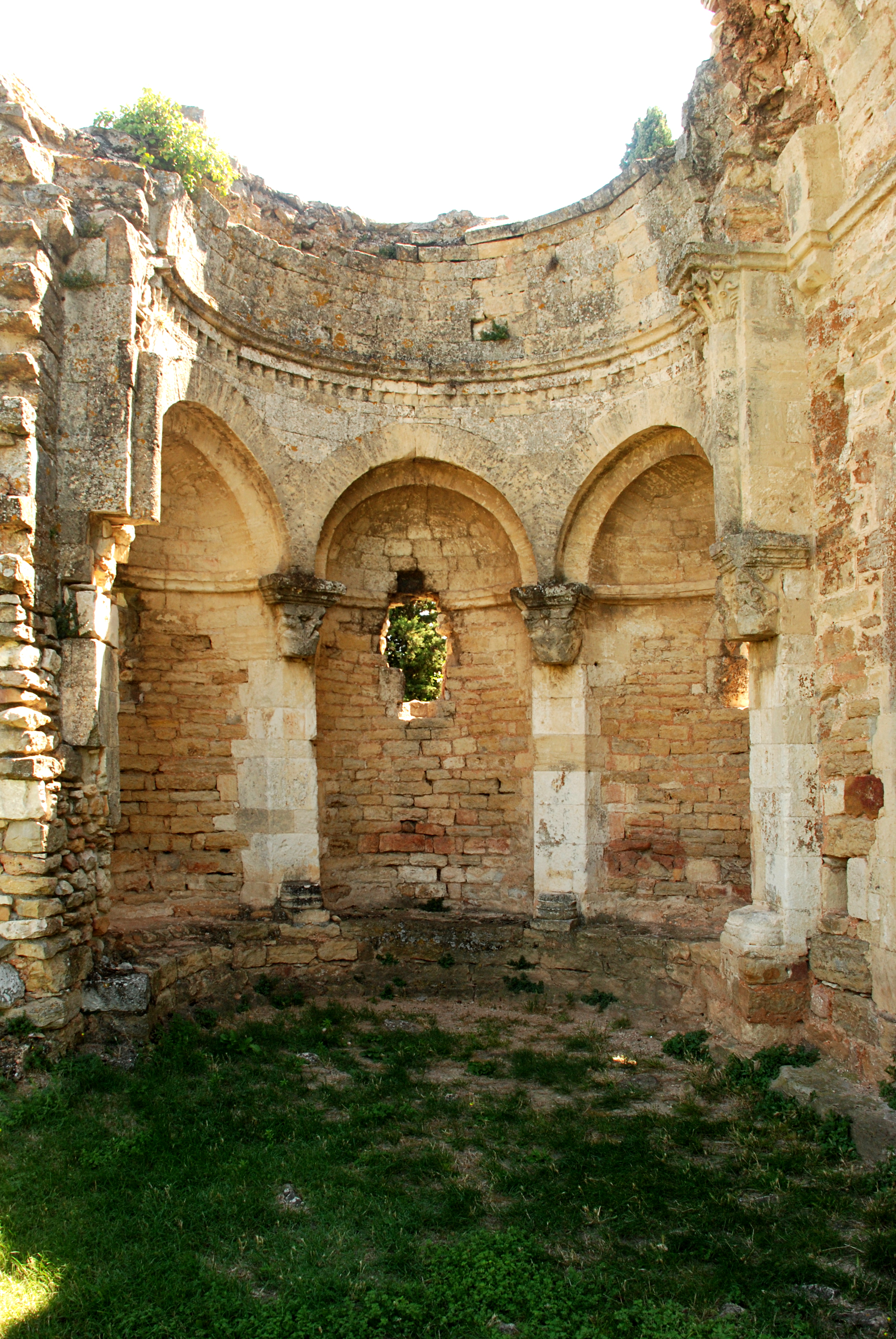 France - Gard - Chapelle Saint-Martin de Saint-Victor-la-Coste